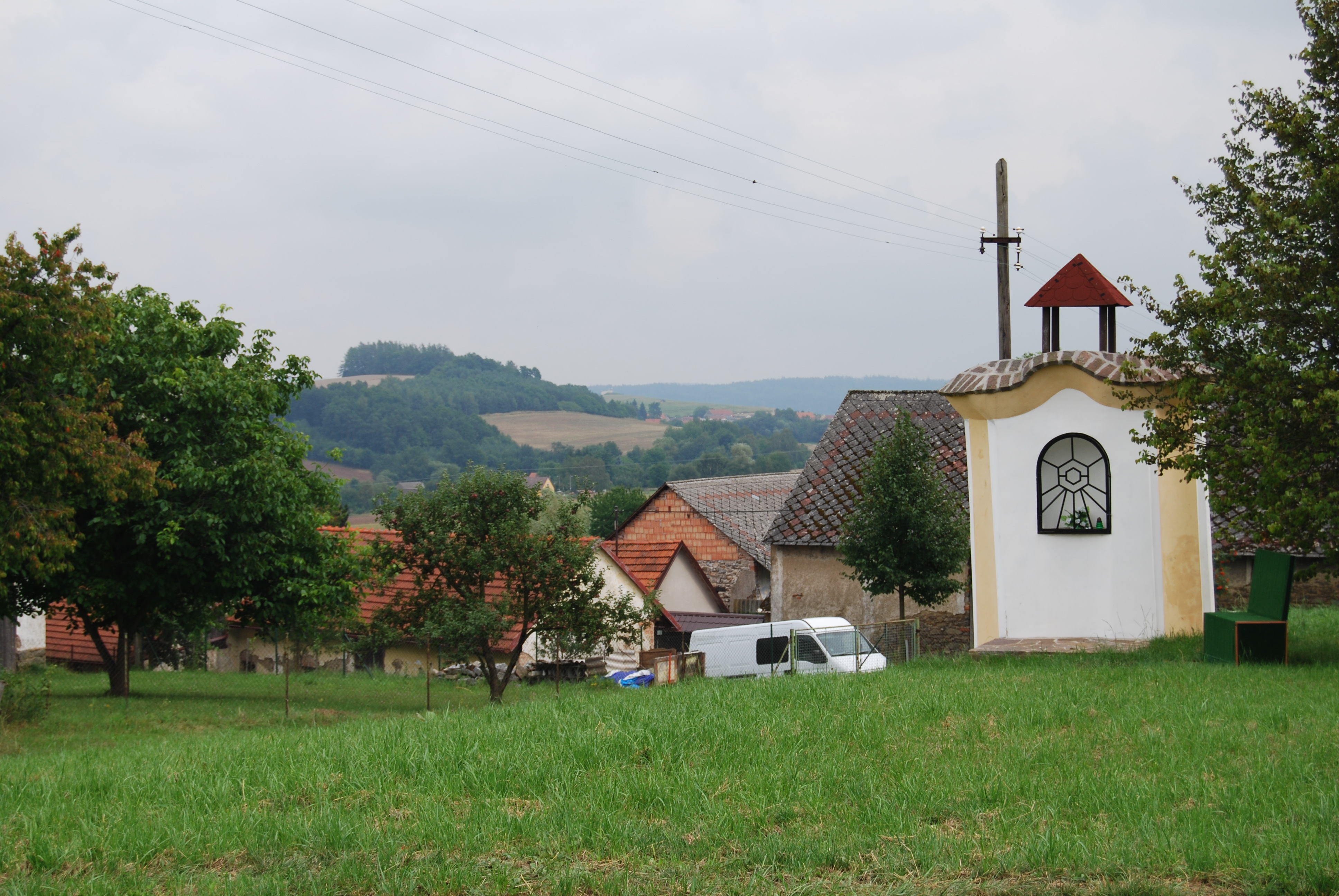 Výklenková kaple poblíž silnice 12138 z Křenoviček do Velkých Heřmanic. Dědkov (Heřmaničky) v okrese Příbram. Česká republika.